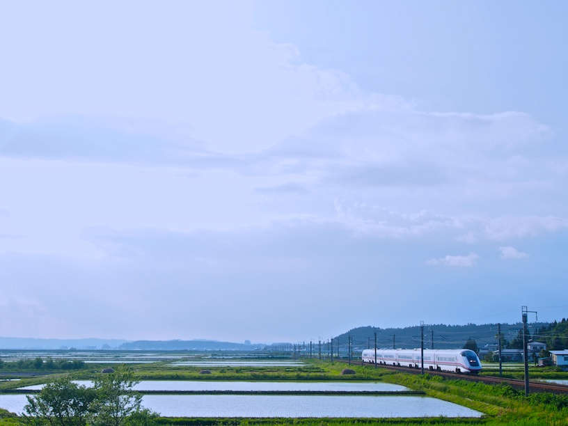 Akita Shinkansen Olympus E-M5